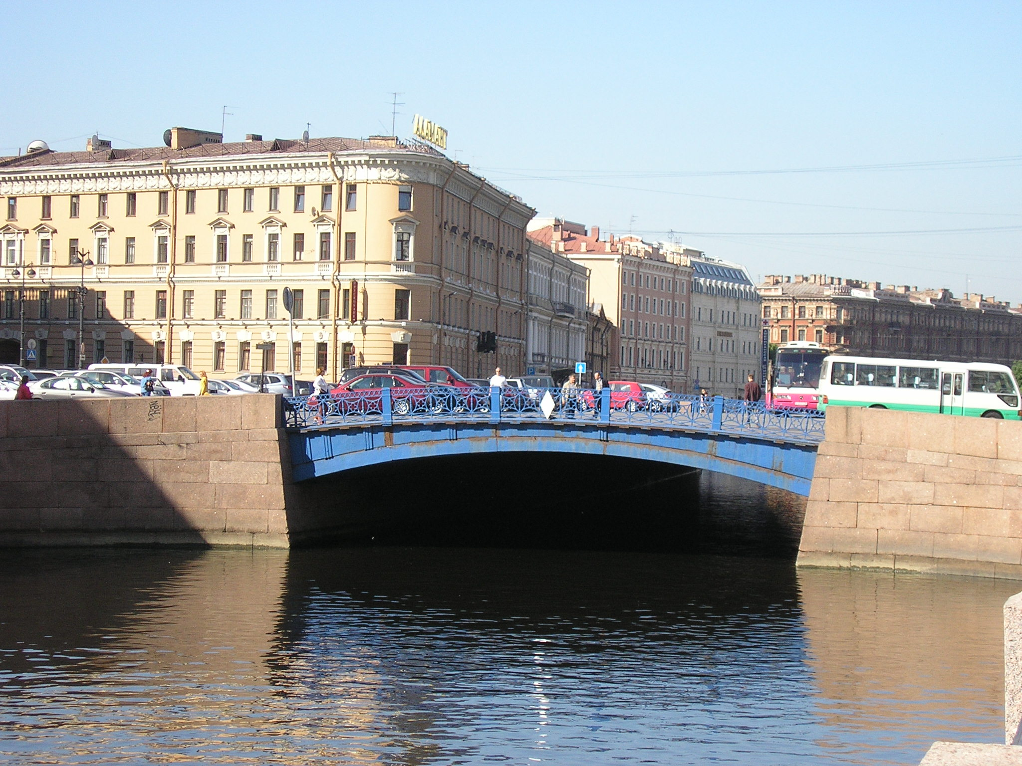 Blue bridge in Sankt Petersburg